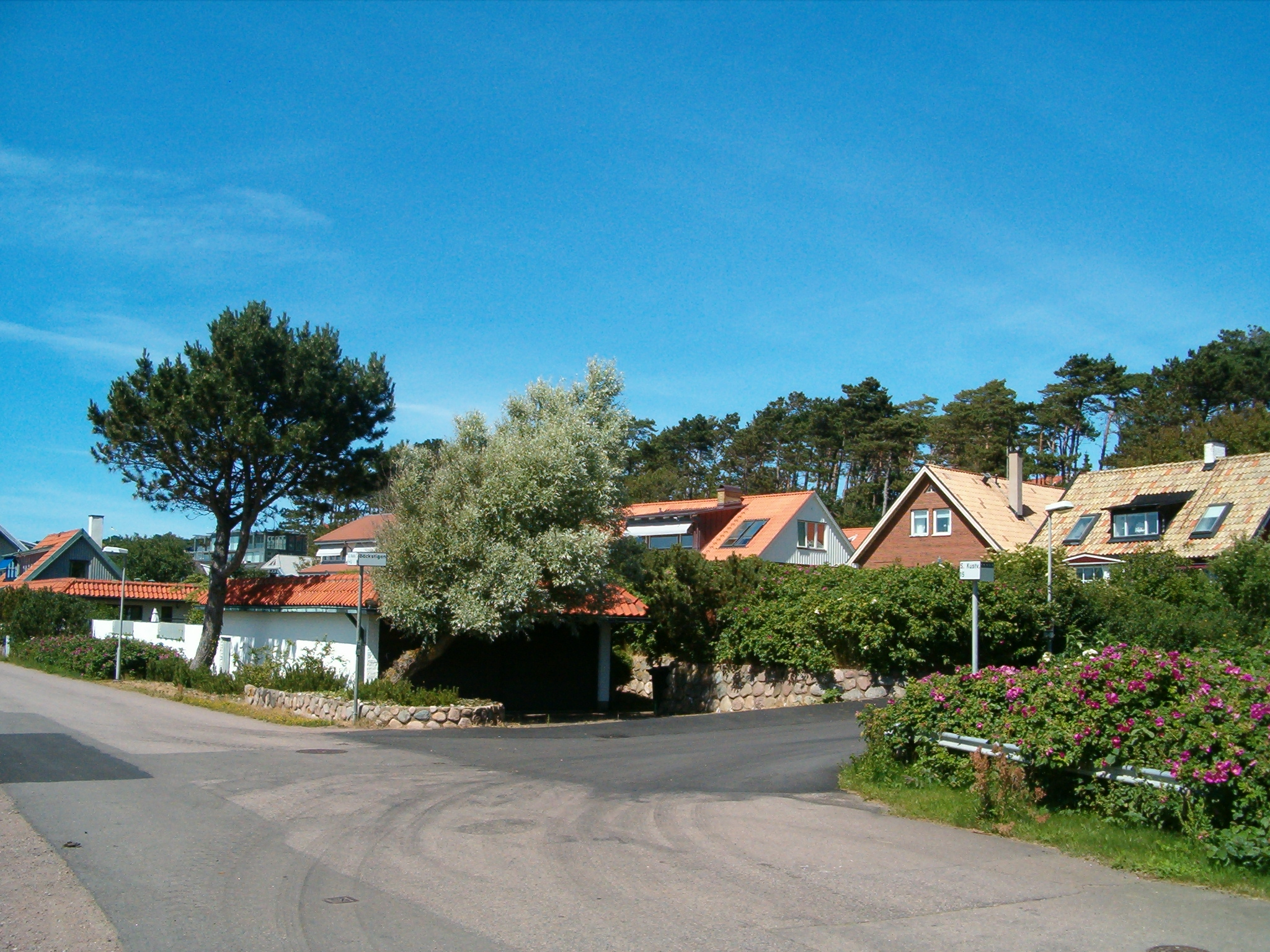 Vy vid Kustvägen i Hittarp, Helsingborgs kommun.